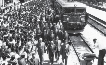 Svečani doček vlaka na električni pogon u Pločama